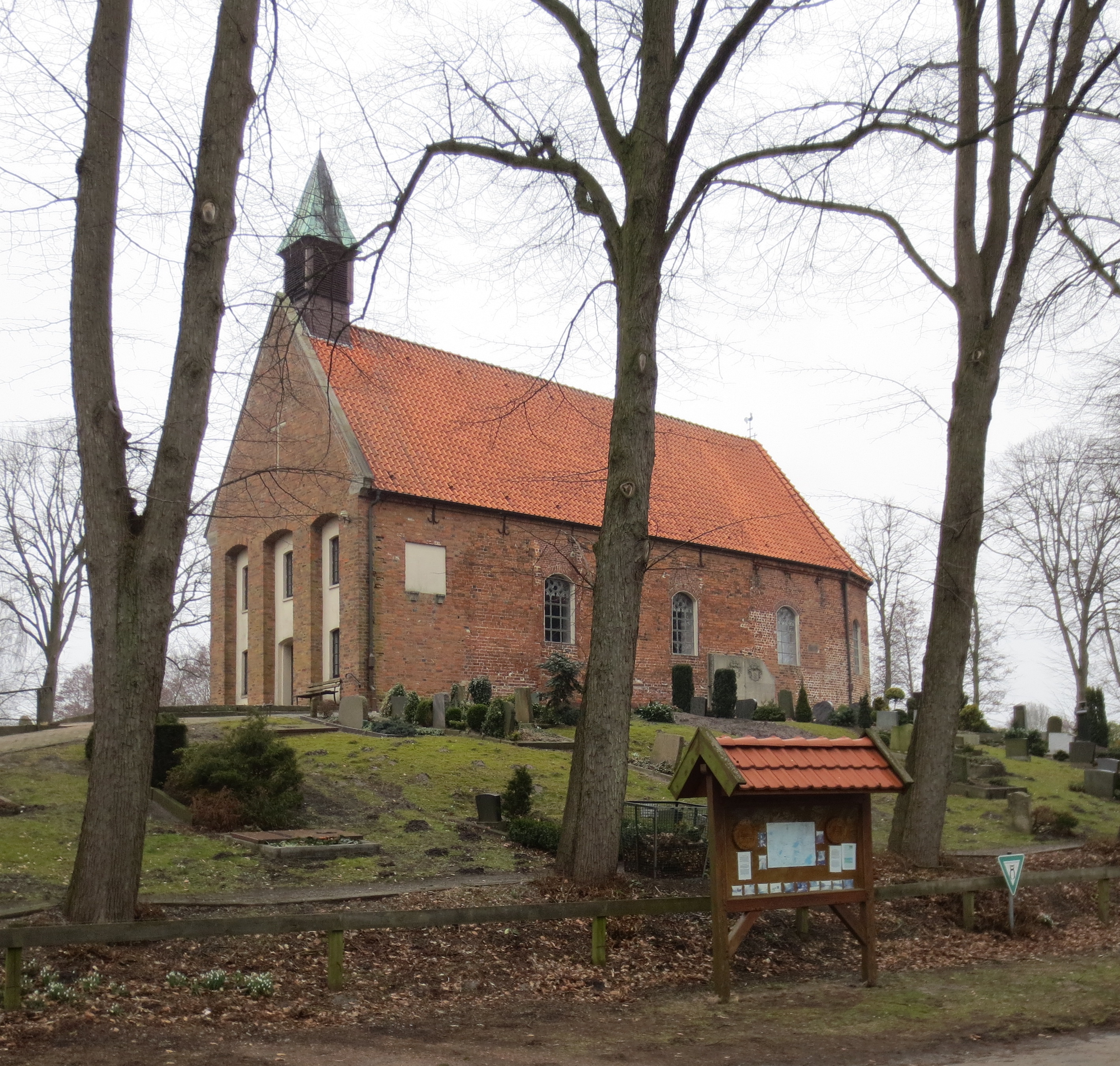 St.-Dionysius-Kirche - erbaut 1277 auf einer Sandkuppe